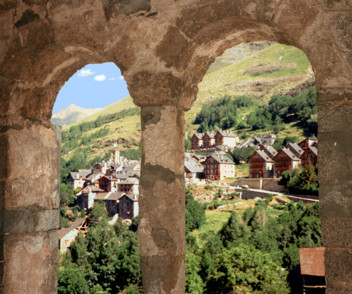 Taüll des del Campanar de Sant Climent